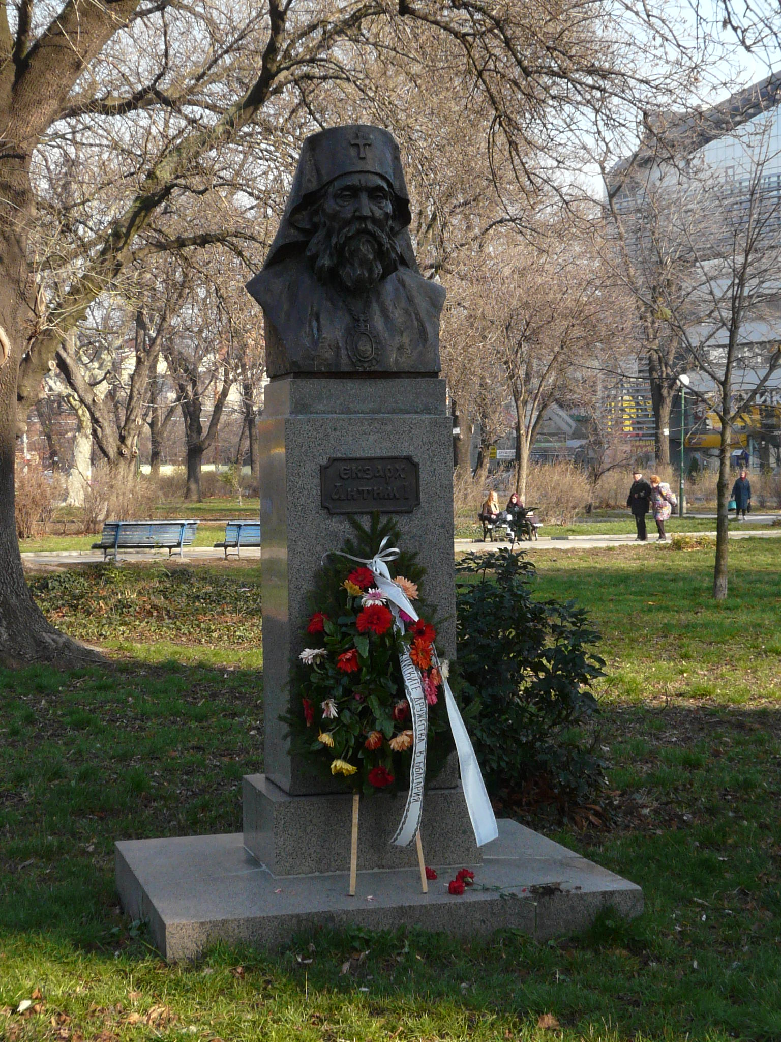 Паметник на екзарх Антим I в кв. Три кладенци, София